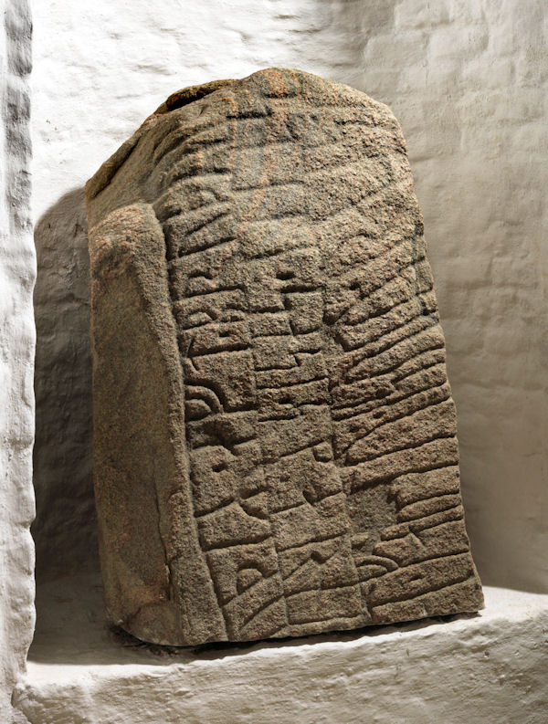 Foto af Roberto Fortuna